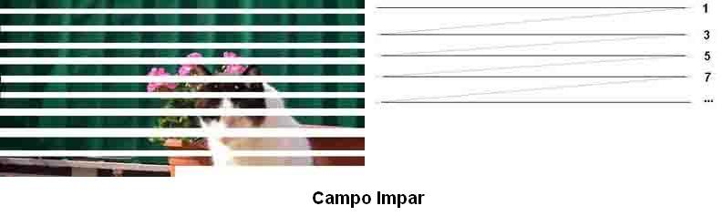 Ejemplo de campo impar en sistema entrelazado